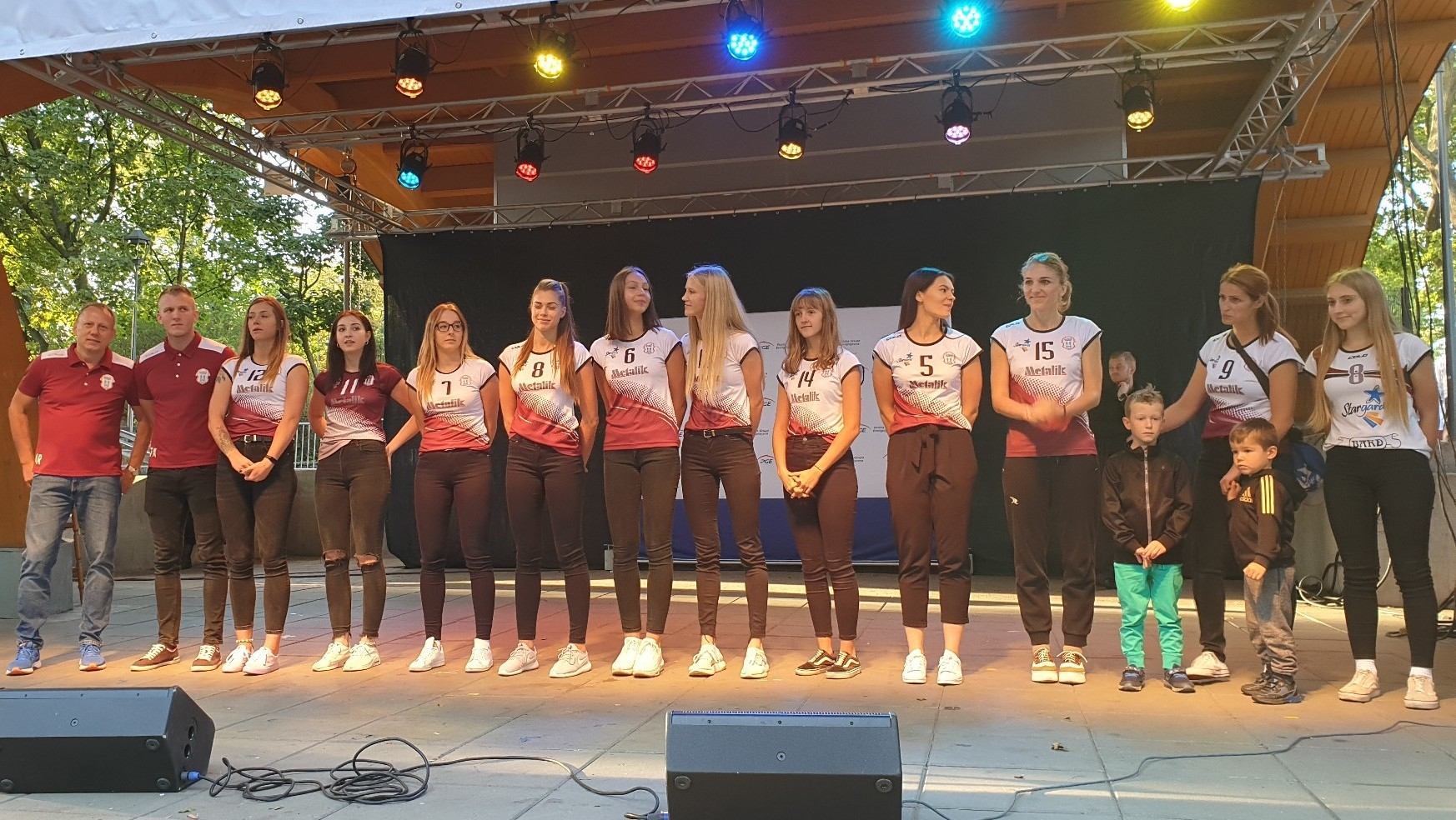 Jubileusz 70-lecia. Siatkarki KS Spójni Stargard